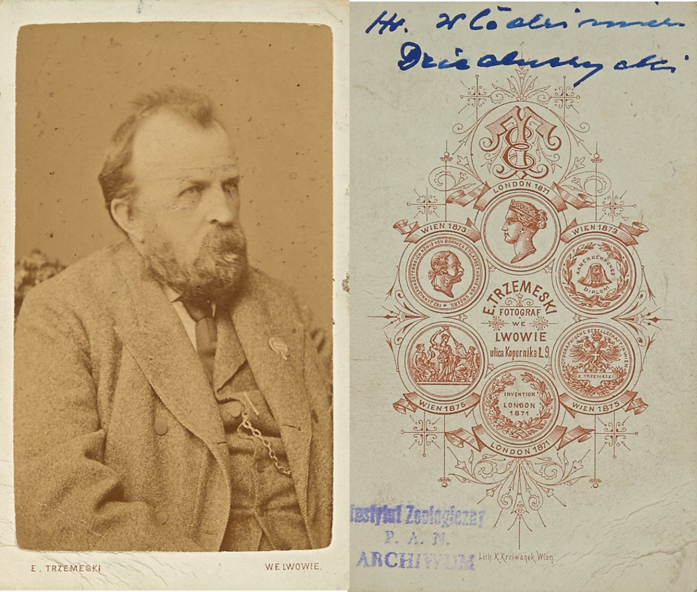 Włodzimierz Dzieduszycki (Carte d'Visite)